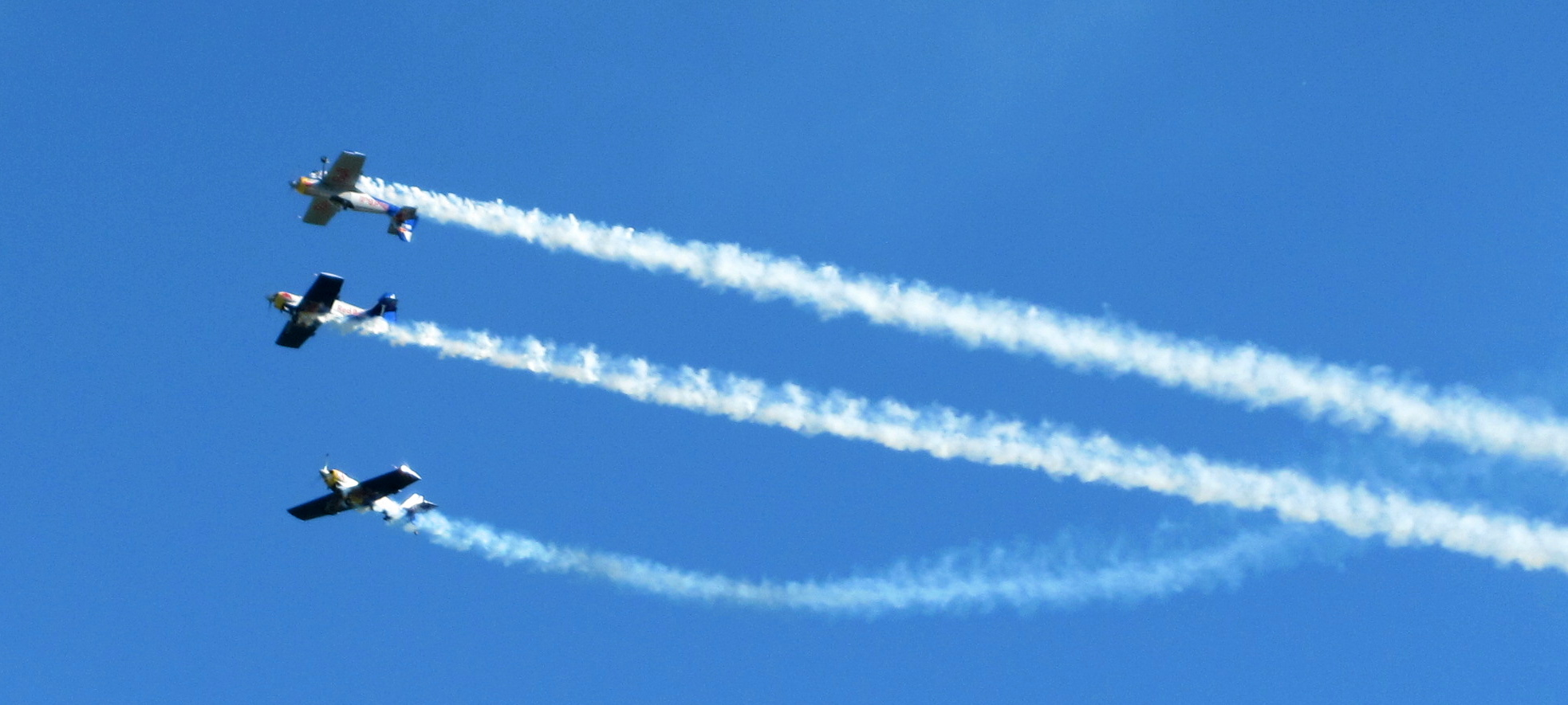 Radka Máchová and Miroslav Krejčí in mirror formation. Jiří Saller rolls around. Jaroměř airfield, 7th June 2014